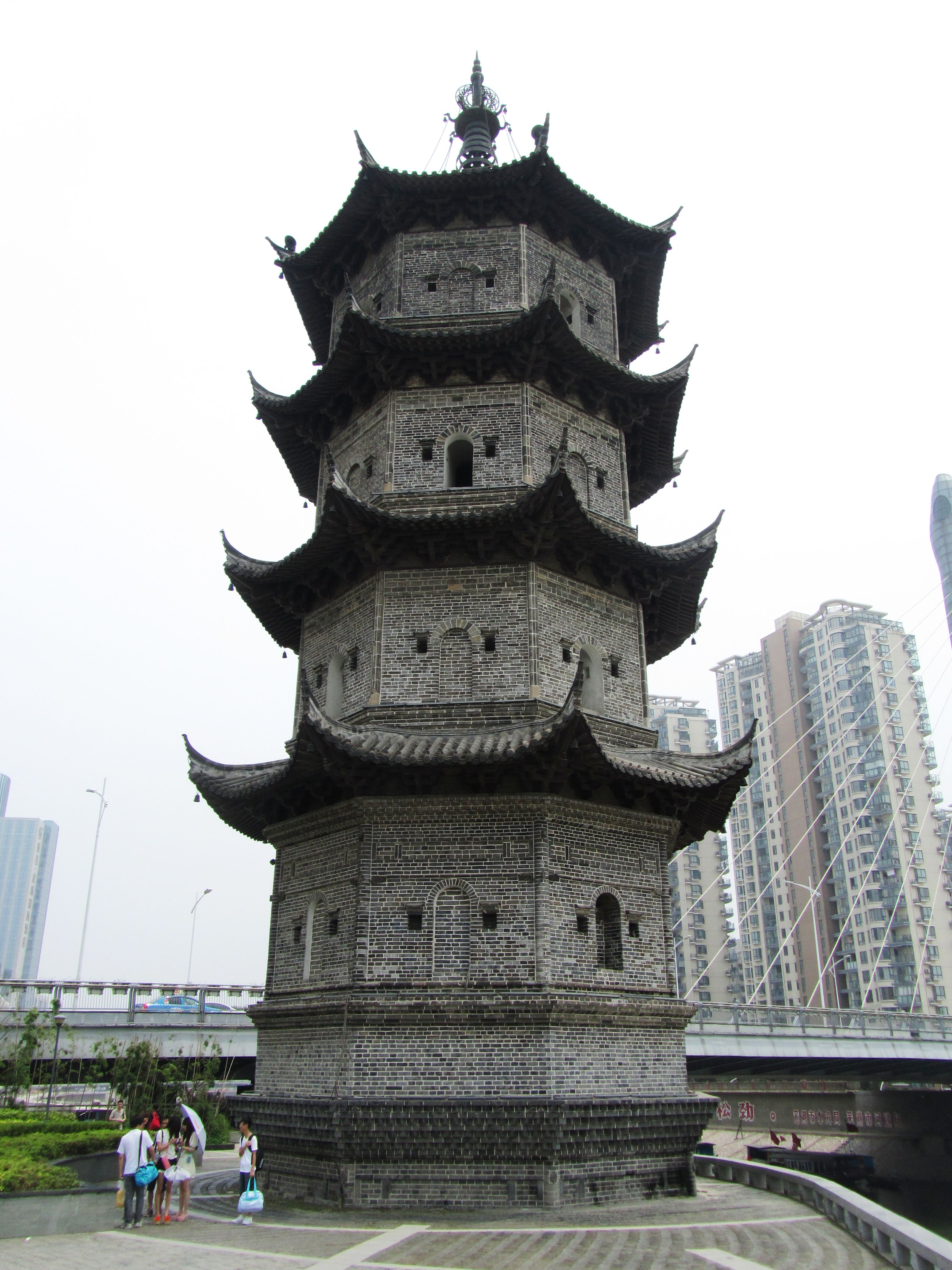 芜湖市长江与青弋江交汇处的中江塔。